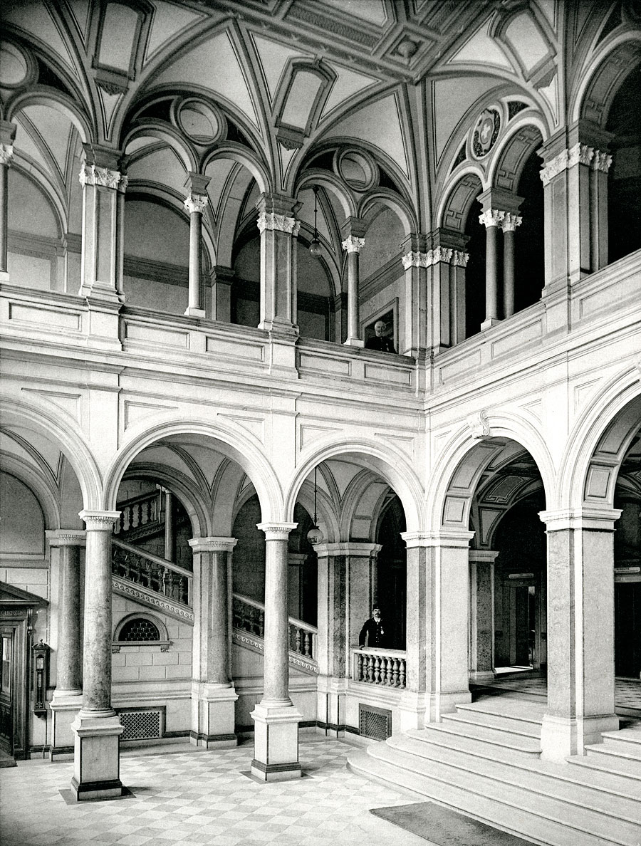 Eingangshalle des Bundeshauses-Ostbau, Bern